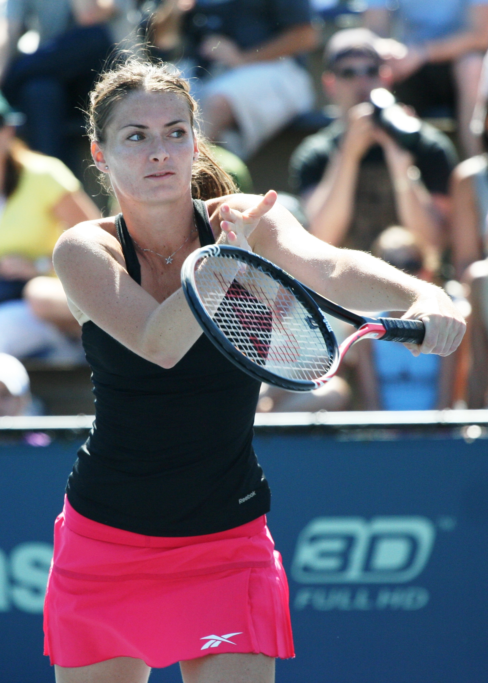 U.S. Open Sunday, Sept. 5, 2010